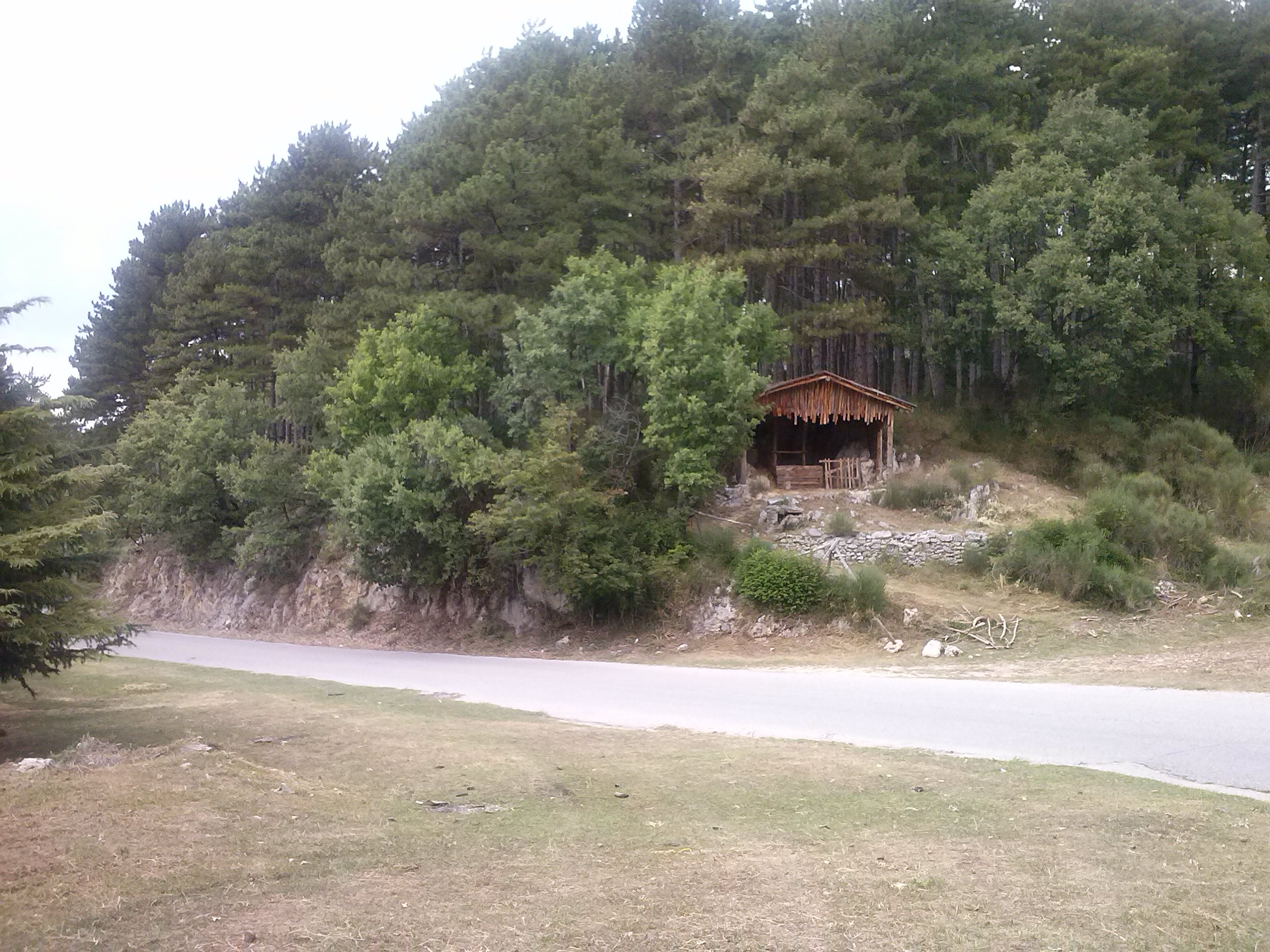 Capanna del presepe di Pereto